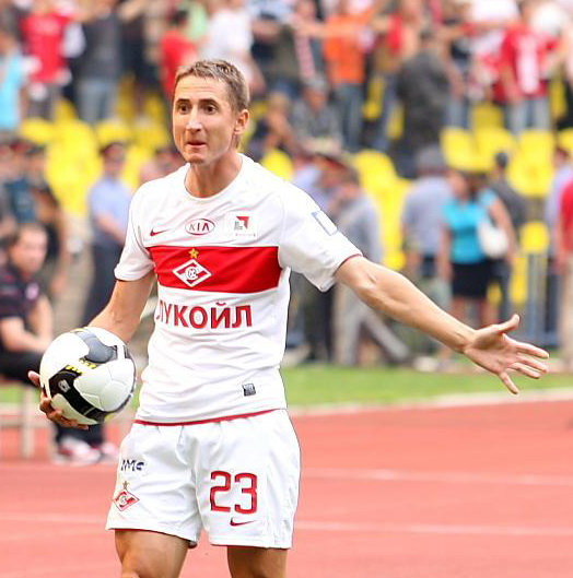 Vladimir Bystrov